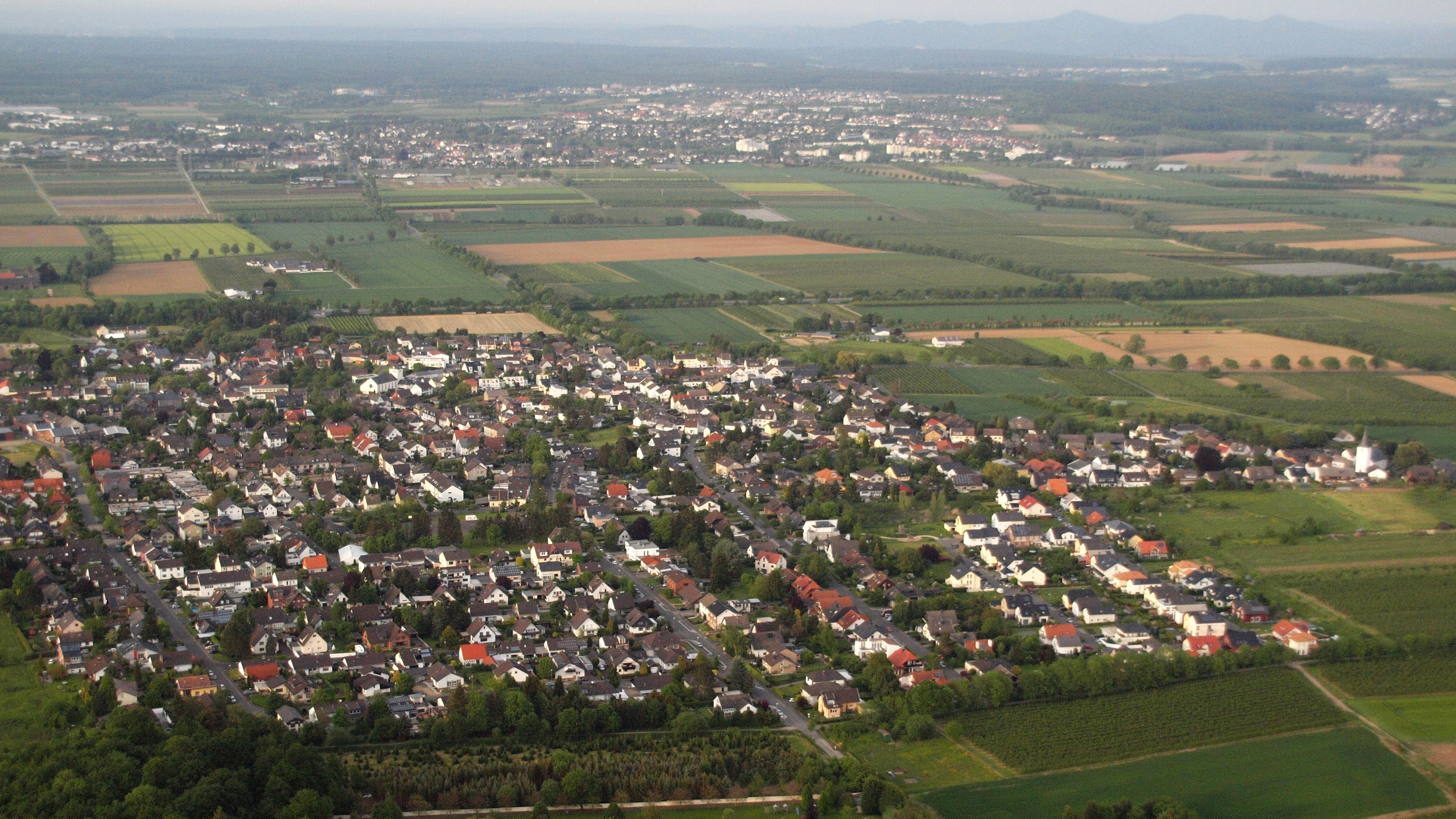 Wormersdorf, Luftaufnahme (2015)